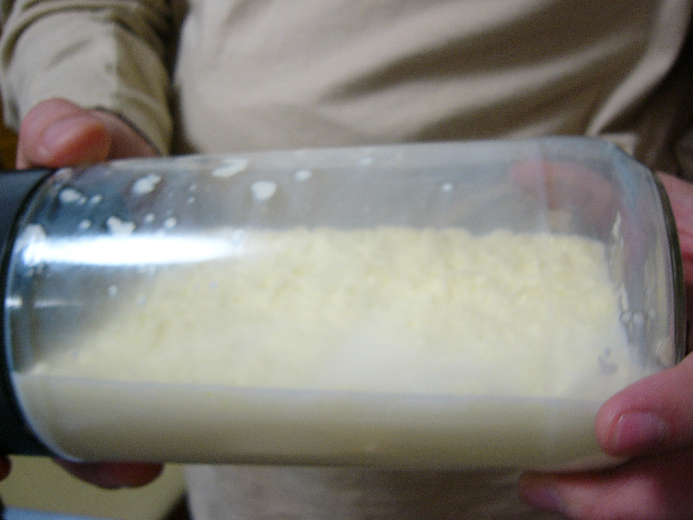 Butter-making（バターづくり、瓶の中に牛乳を入れて振ると脂肪分が分離する）,北海道興部町で撮影